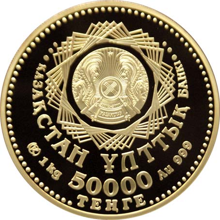 Памятная монета Республики Казахстан «15-летие введения национальной валюты» - 50000 тенге - золото - аверс